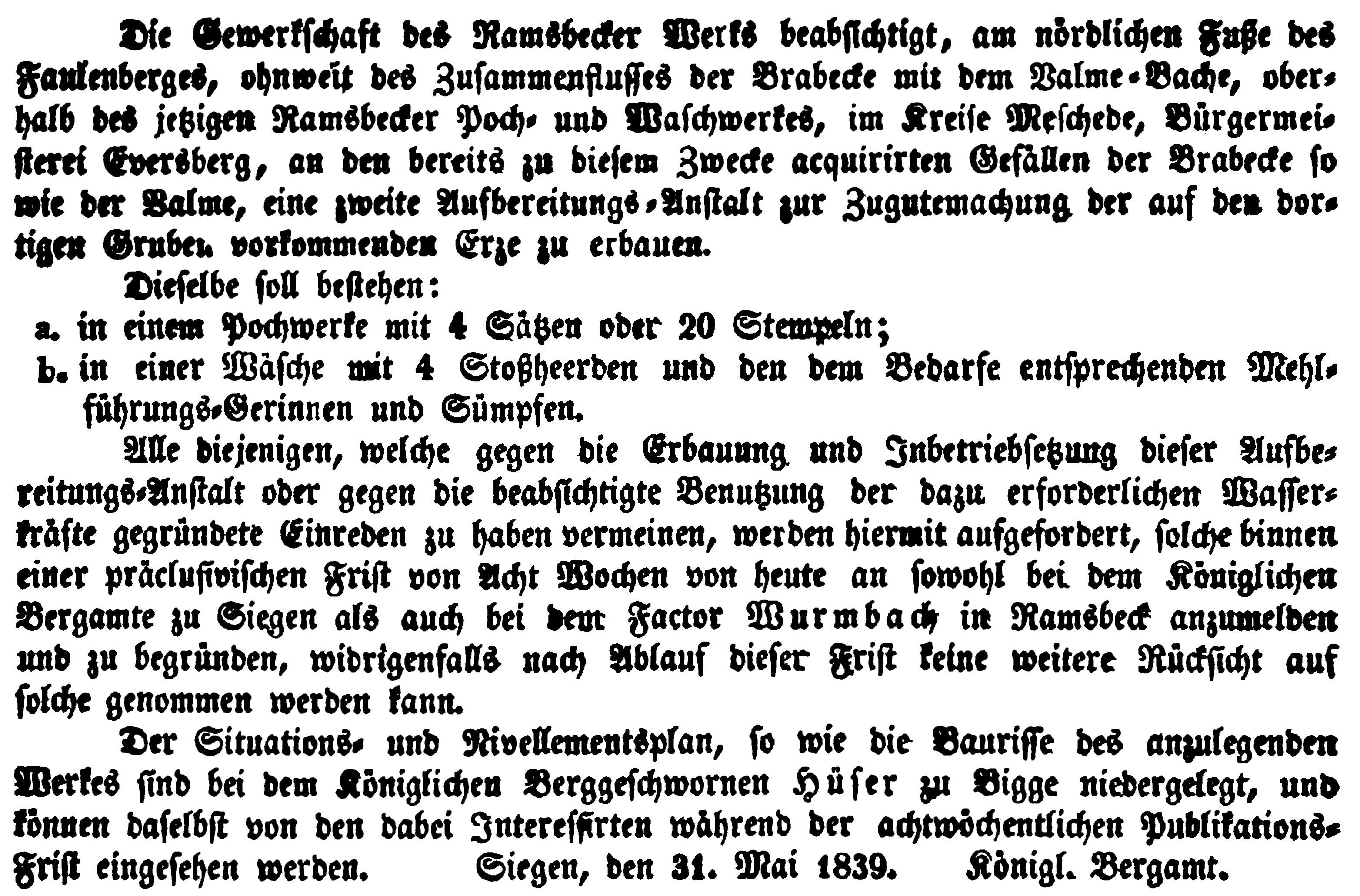 Erbauung einer Aufbereitungsanstalt bei Ramsbeck